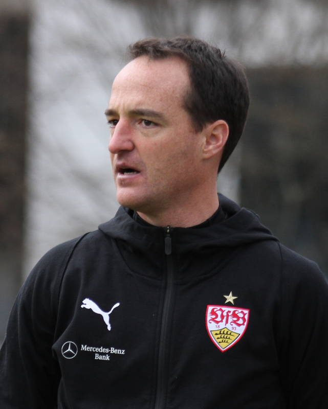 Nico Willig beim U19-Junioren-Spiel gegen Mainz 2019. Aufgenommen von